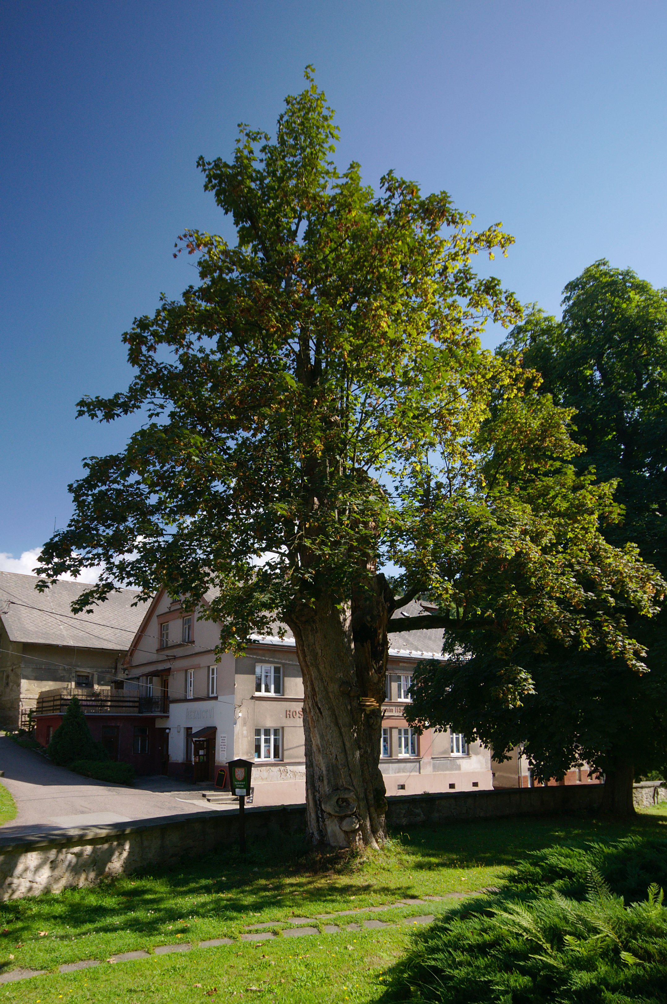 Klášterecký klen, Klášterec nad Orlicí, okres Ústí nad Orlicí